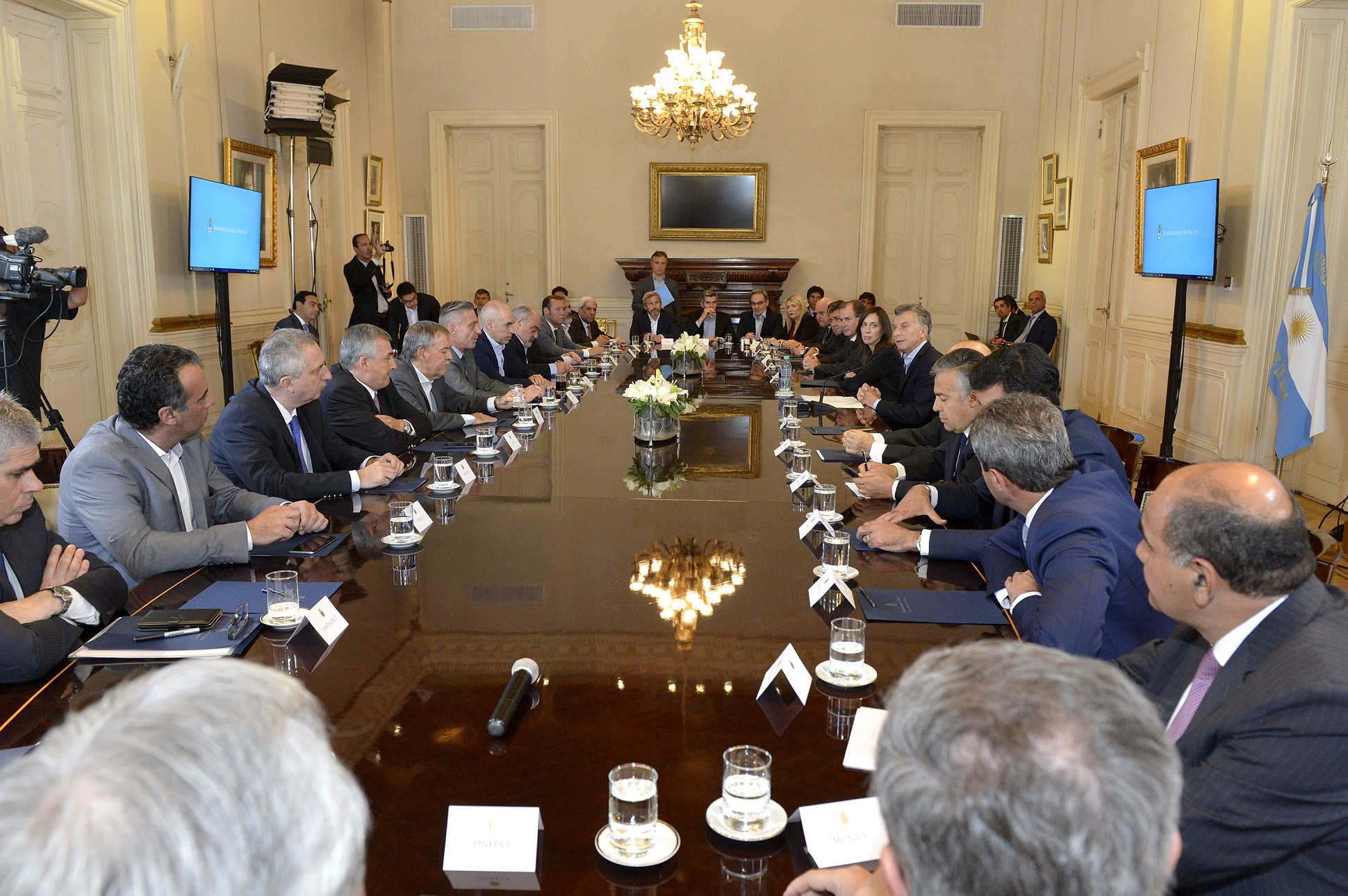 El presidente de Argentina Mauricio Macri firma con 22 de los 23 gobernadores y el jefe de gobierno de la ciudad de Buenos Aires el "Consenso Fiscal".